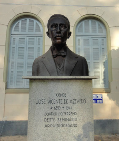 Estátua do Conde José Vicente de Azevedo (1859-1941) doador do terreno do Seminário Central do Ipiranga.